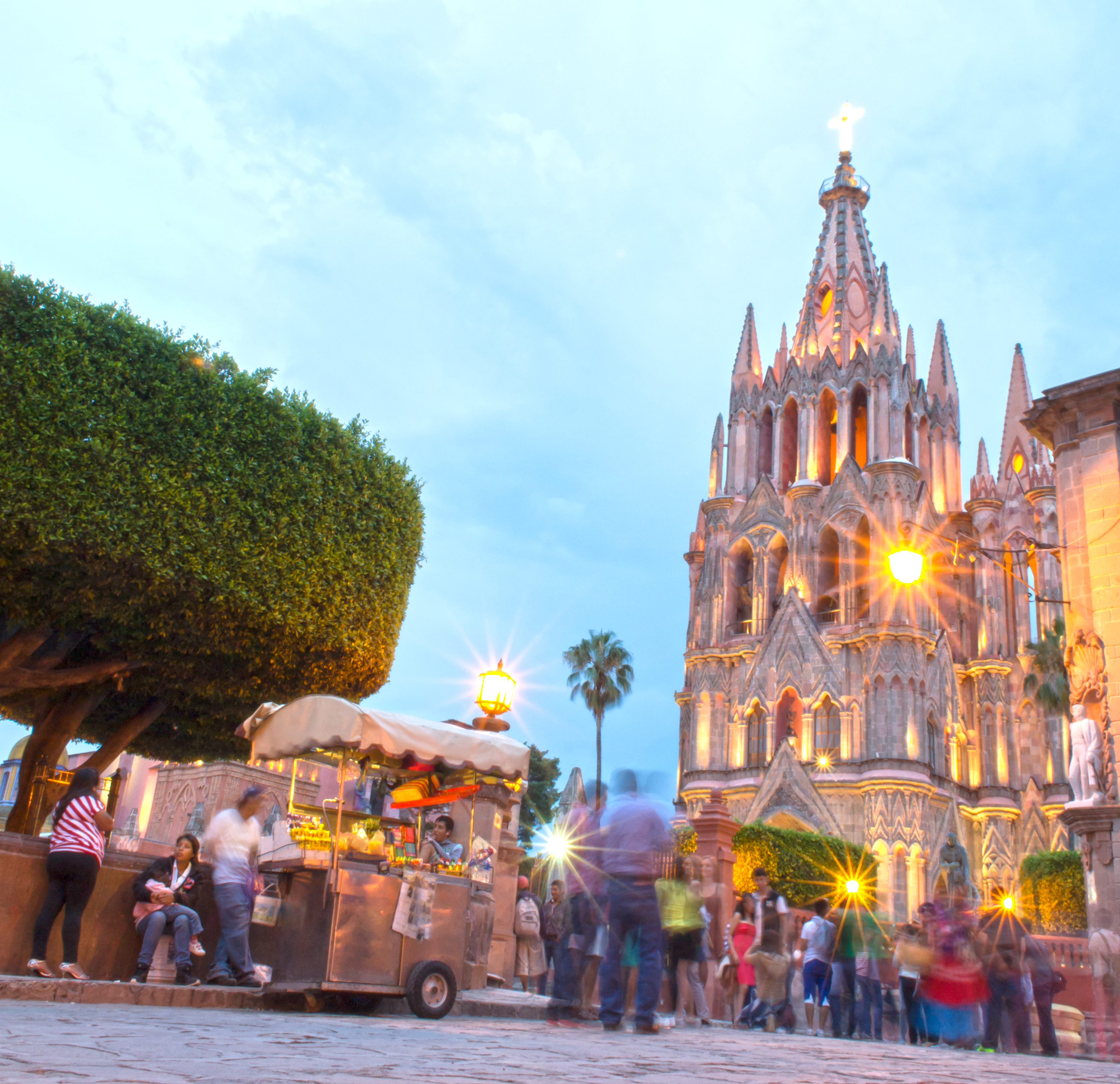 San Miguel de Allende, Guanajuato